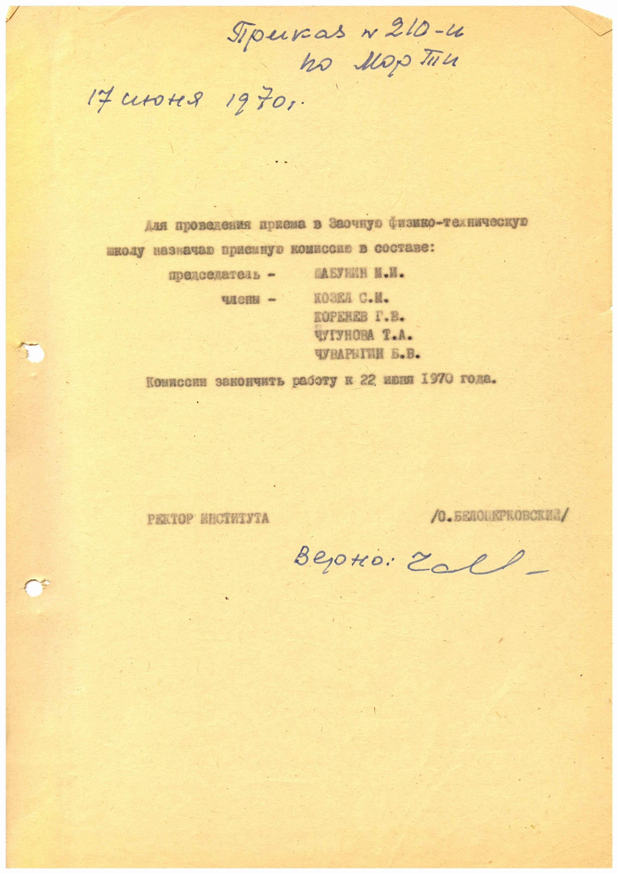 Приказ ректора МФТИ О.Белоцерковского о назначении членов приемной комиссии в ЗФТШ